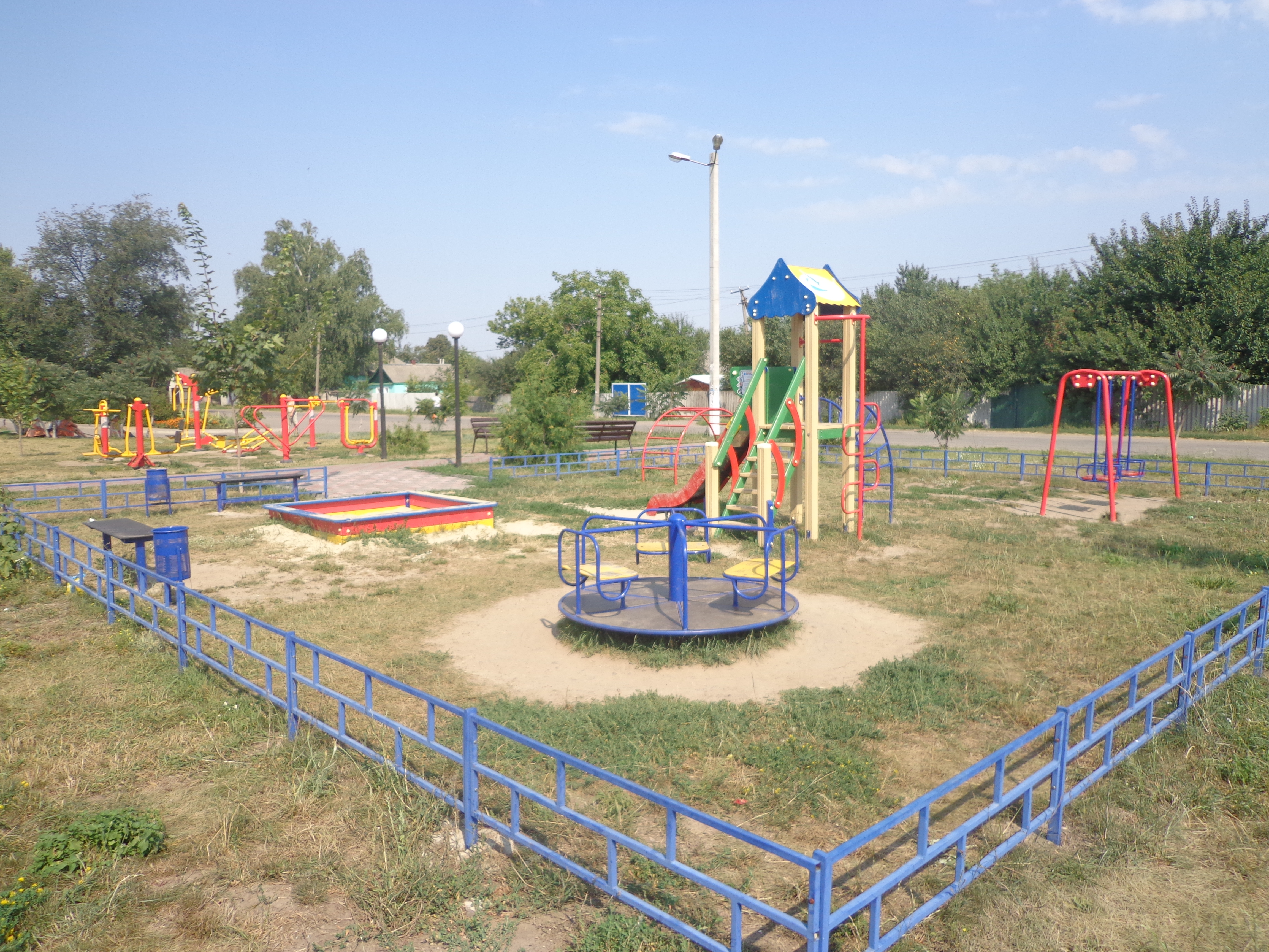 Детская площадка у вокзала. Село Огульцы, Валковский район, Харьковская область, Украина.